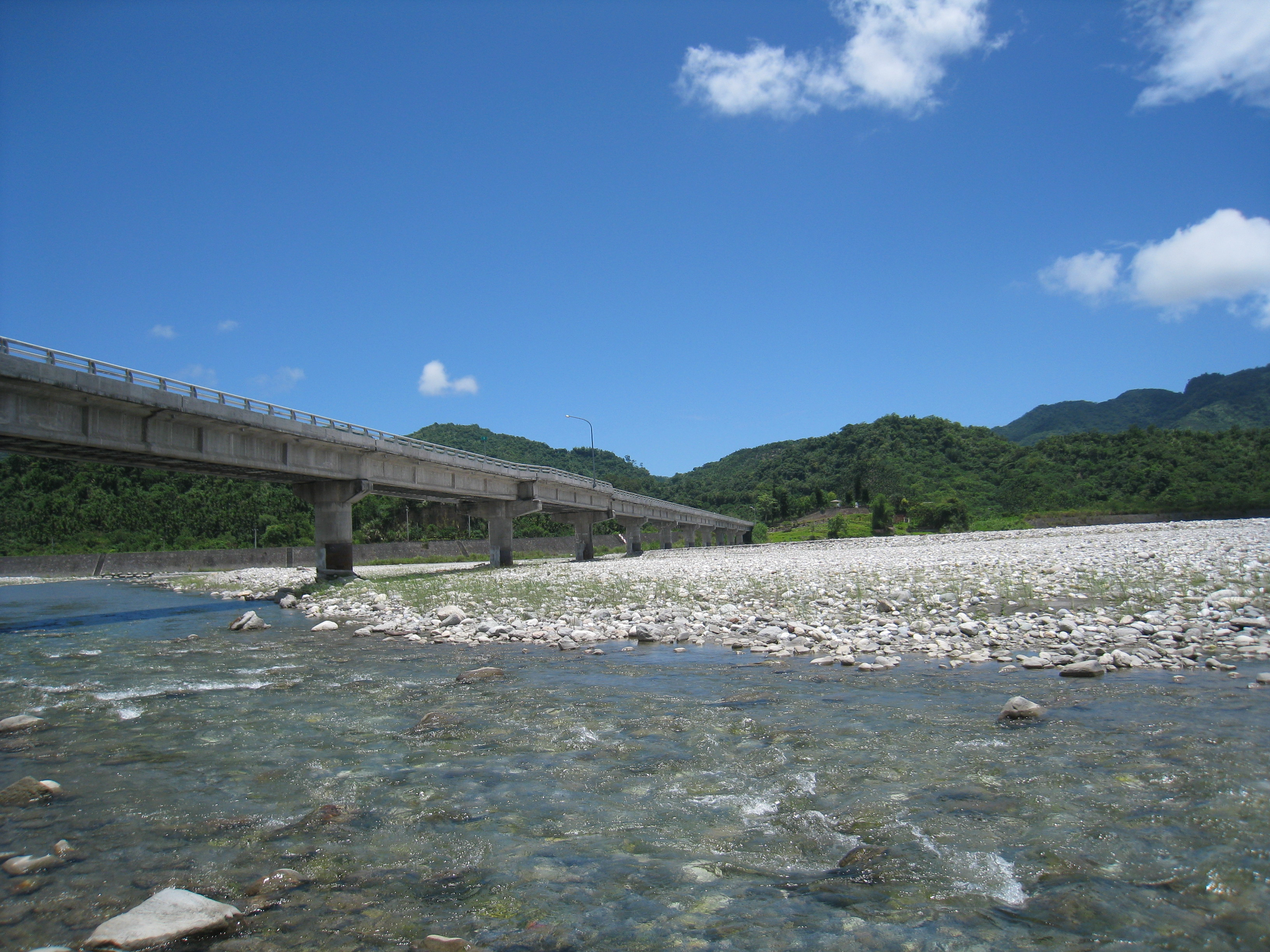 花蓮縣箭瑛大橋。